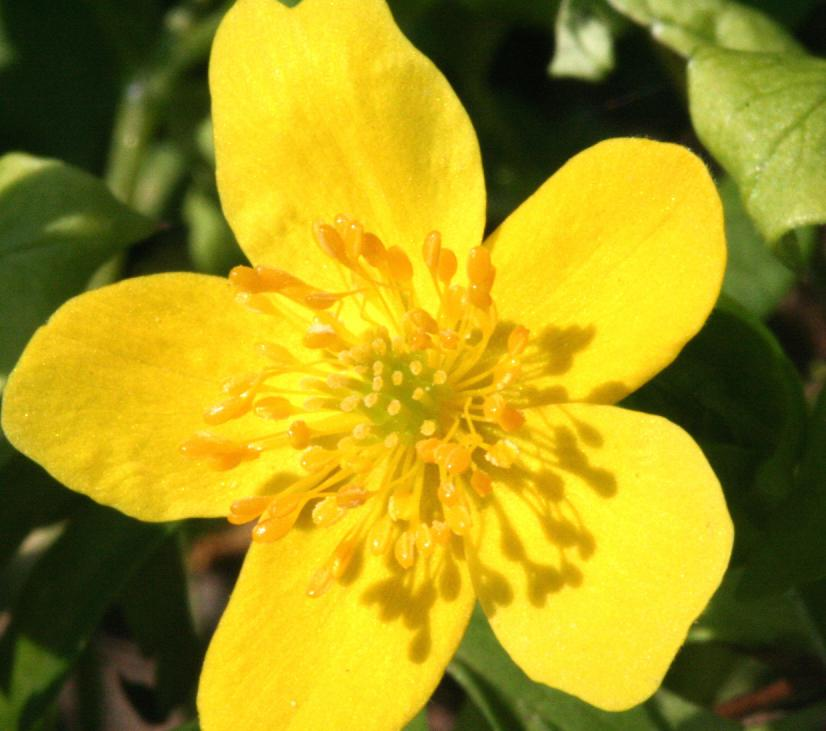 Anemone ranunculoides